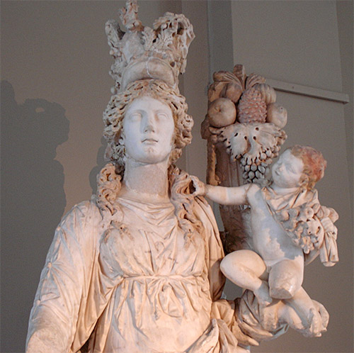 Déméter (ici représenté sous les traits de Tyché) en compagnie de Ploutos